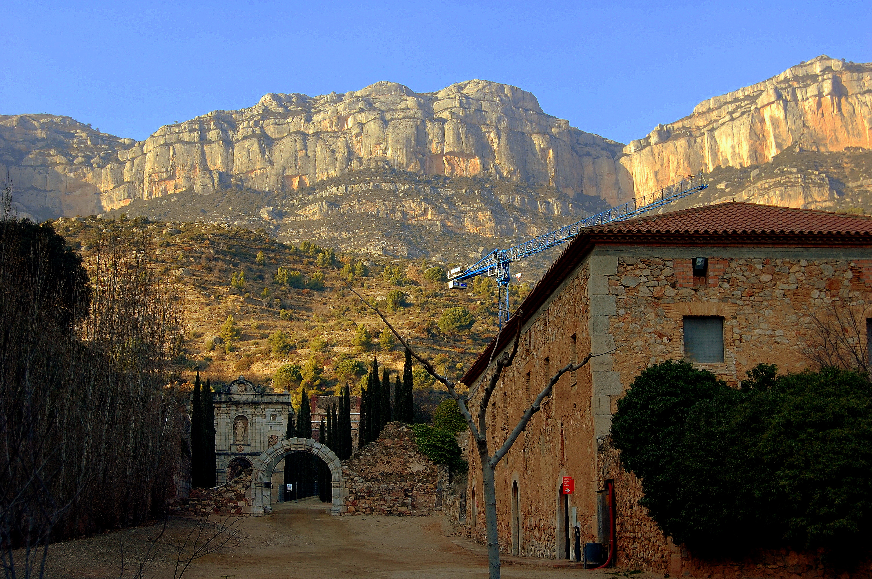 Cartoixa d'Escaladei (la Morera de Montsant)